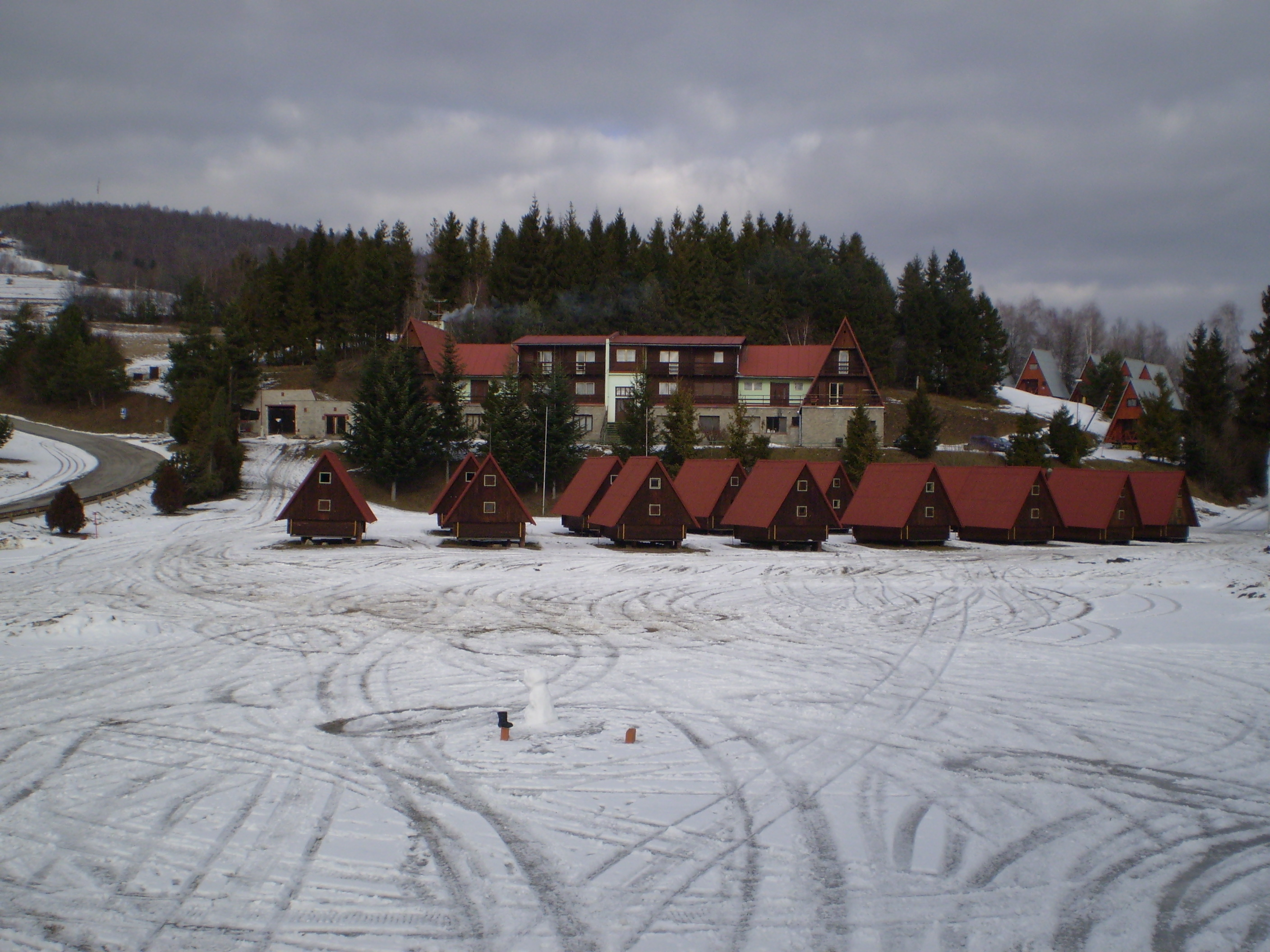 Krokava